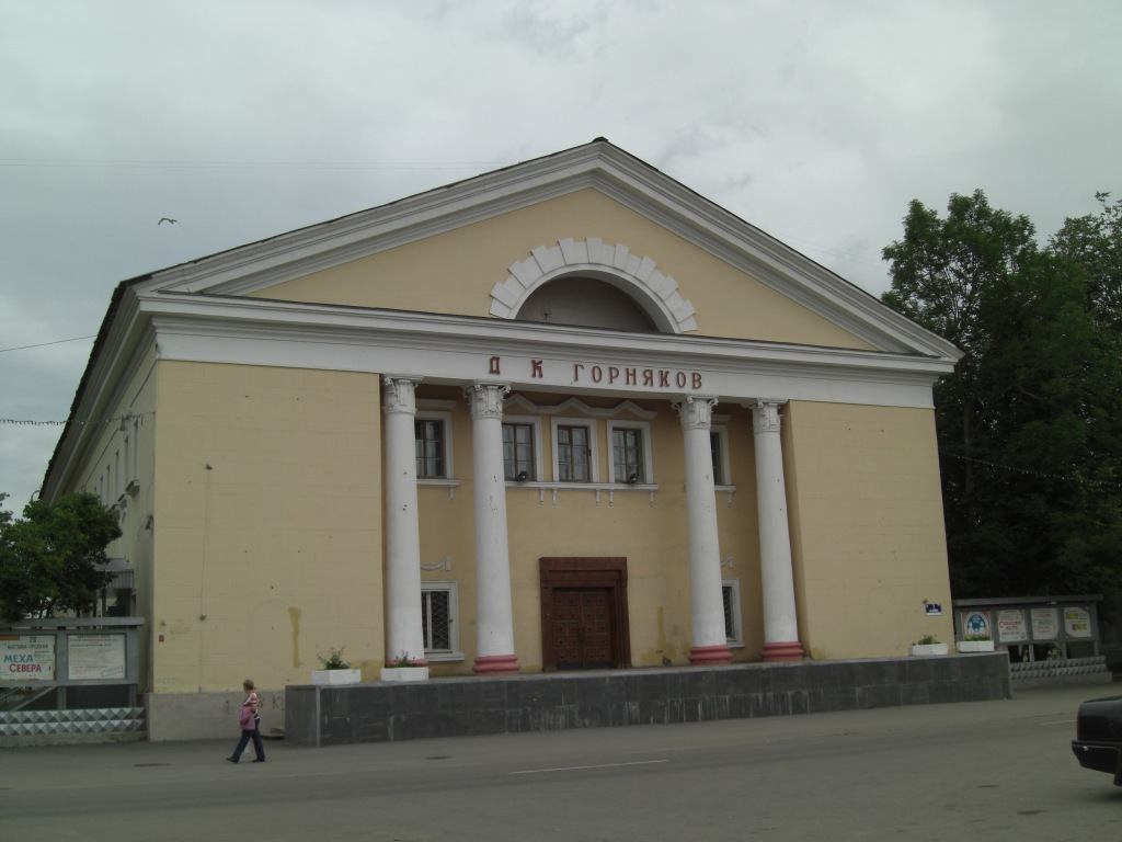 ДК Горняков в Сланцах (Ленинградская область)